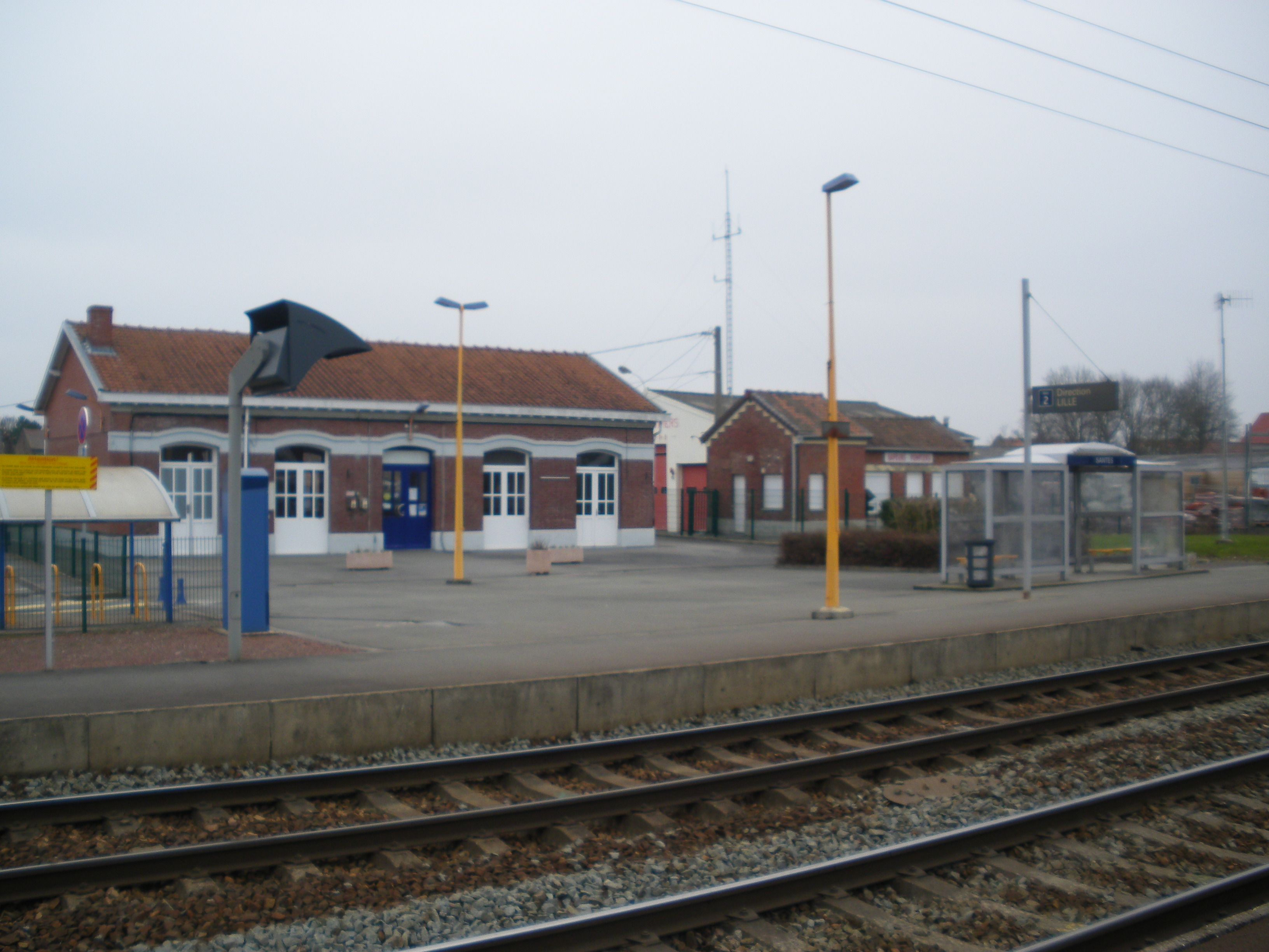 Vue de la gare de Santes depuis le quai.